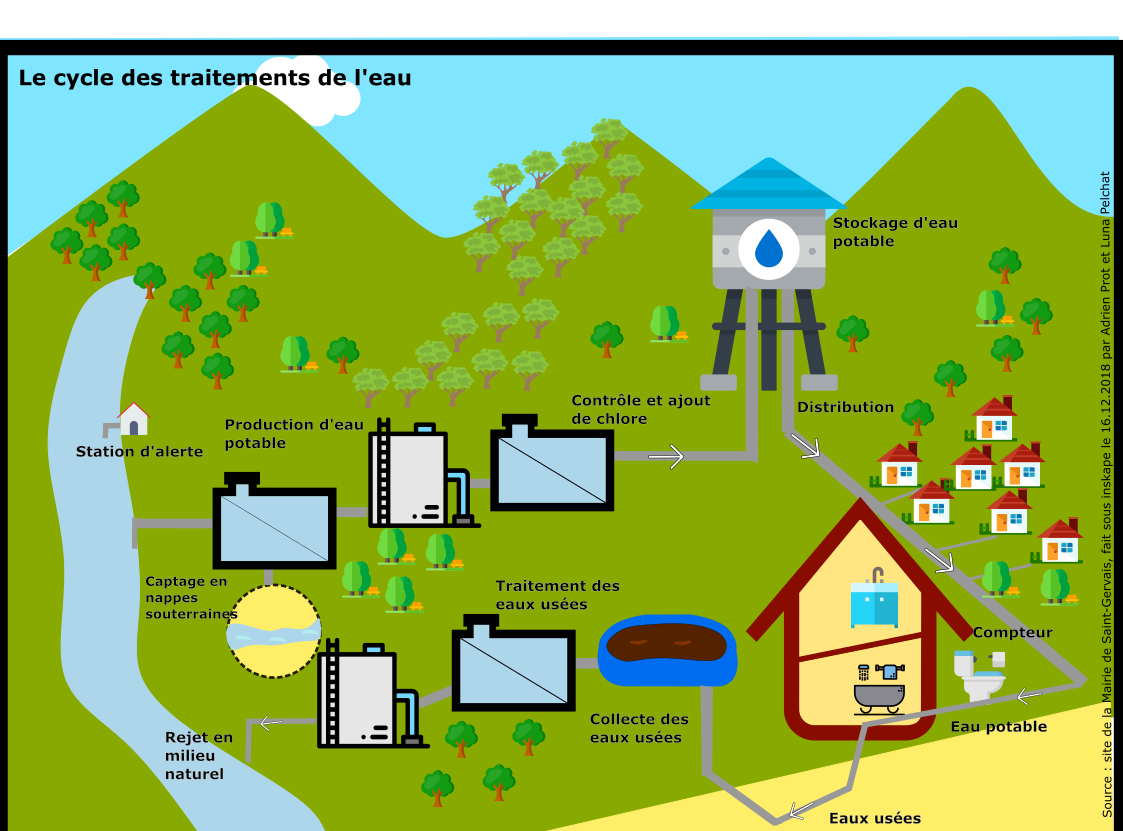 schéma représentant le petit cycle de l'eau